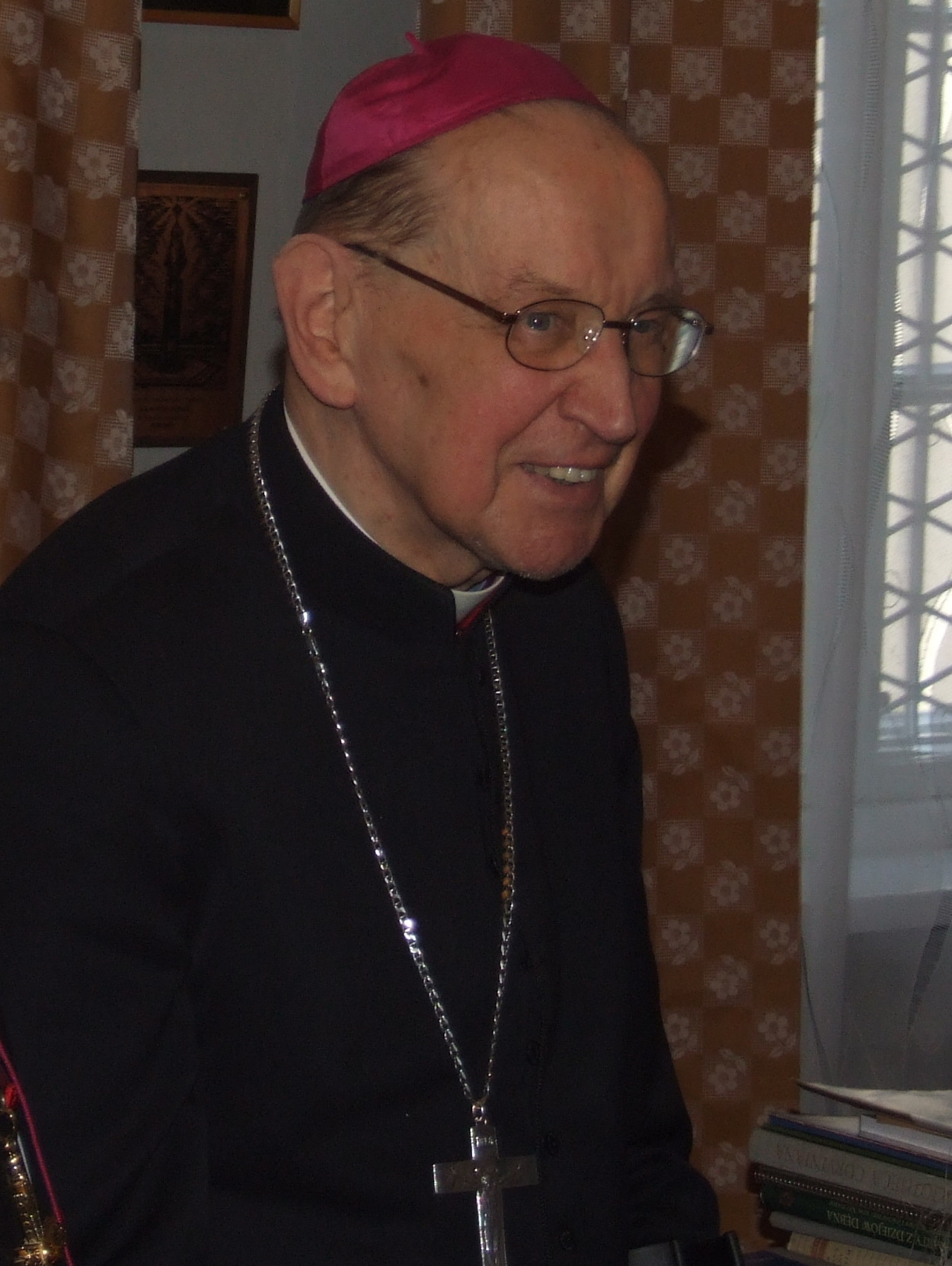 bp Czesław Lewandowski